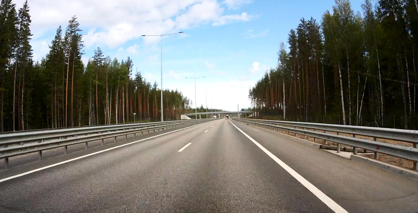 Трасса М-11 в районе моста через р.Барановку, Вышневолоцкий р-н